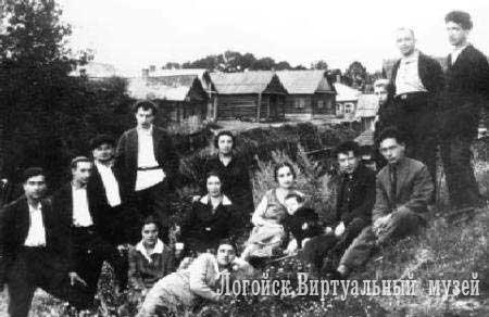 Еврейские писатели, художники, их семьи на отдыхе в Логойске. Стоят (справа налево): Изи Харик, Арон Кастелянский с сыном Соломоном, Меер Аксельрод, Шая Гольдштейн, Мендель Гольдштейн, Мендель Горшман. Сидят (справа налево): Шмуэль Персов, Зелик Аксельрод, Дора Кастелянская с дочерью Рахиль.